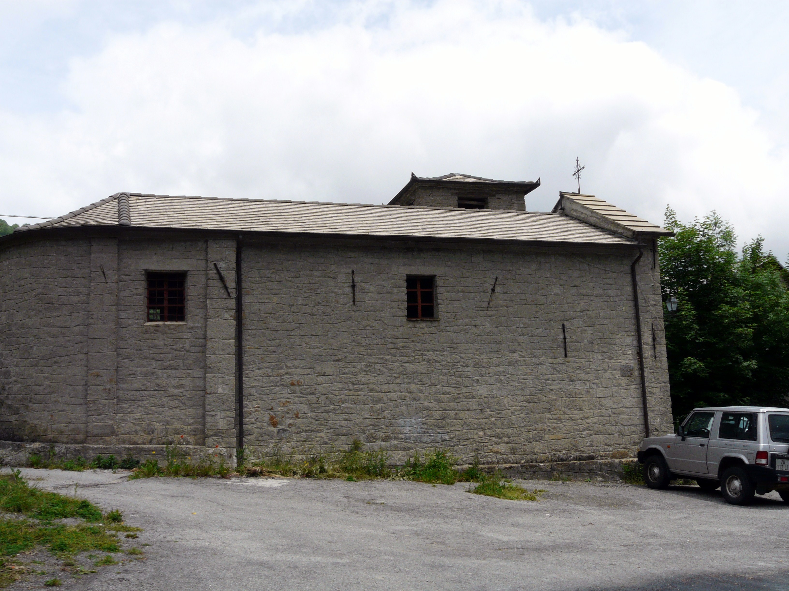 L'oratorio di San Rocco a Secorte, Alpepiana, Rezzoaglio, Liguria, Italia